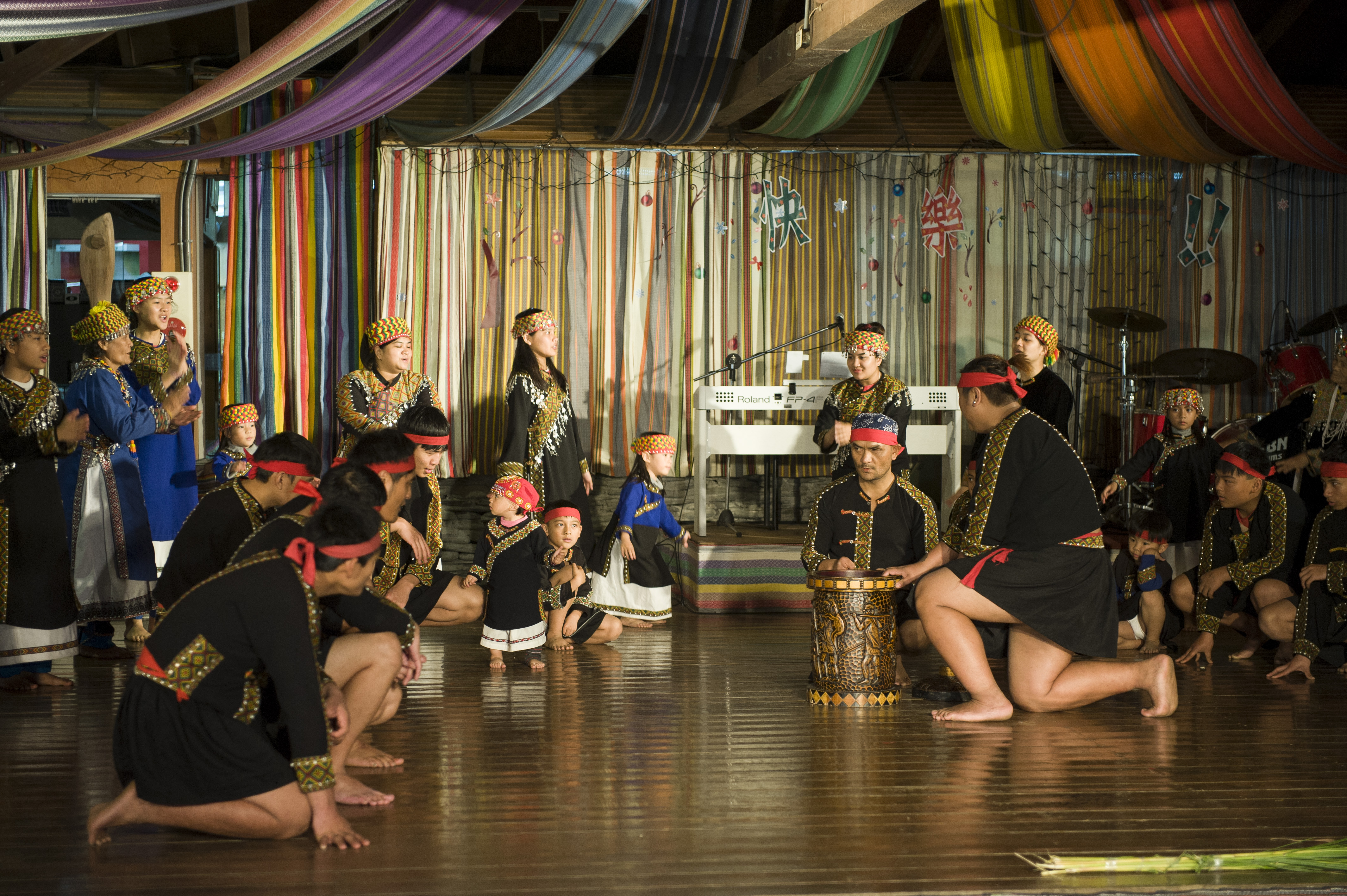 953, Taiwan, 台東縣延平鄉桃源村